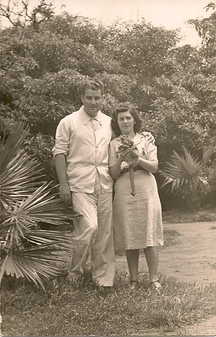 Foto realizada durante la travesía de inauguración de la Ruta Nacional Nº 12 al Iguazú. Aquí se observa a su esposa y a un mono tití que poseían de mascota y actualmente se encuentra embalsamado en el Museo Montoya de Posadas, Misiones, Argentina.